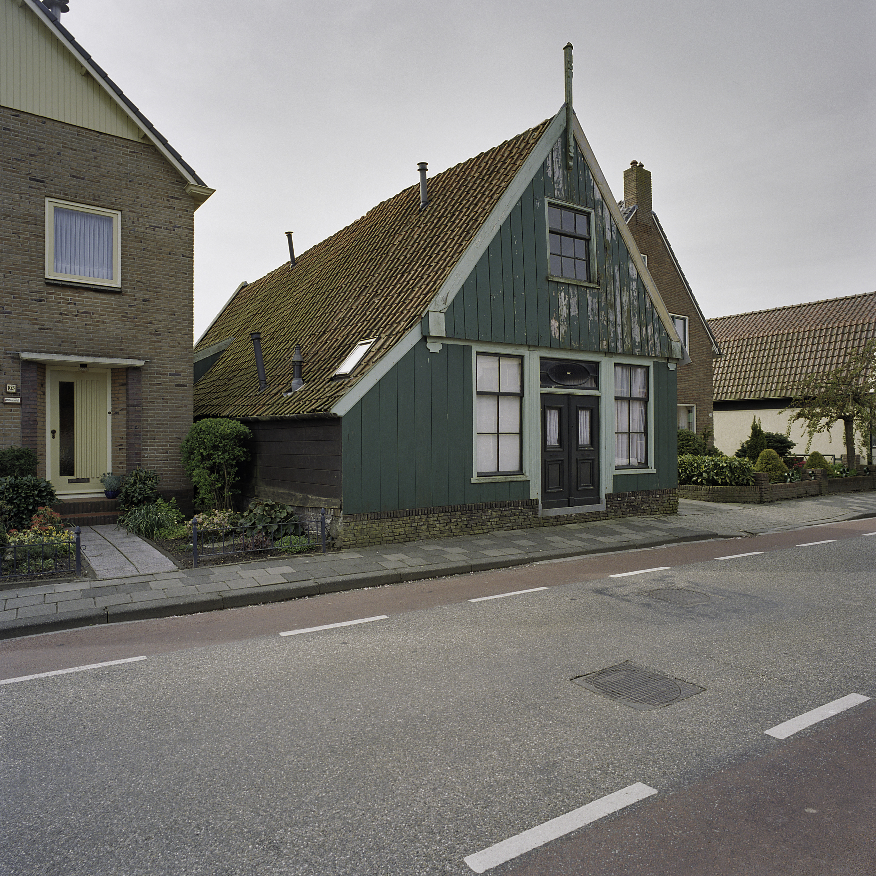 Winkel/ Voorschot: Voorgevel van winkel met houten voorschot (opmerking: Gefotografeerd voor Monumenten In Nederland Noord-Holland)